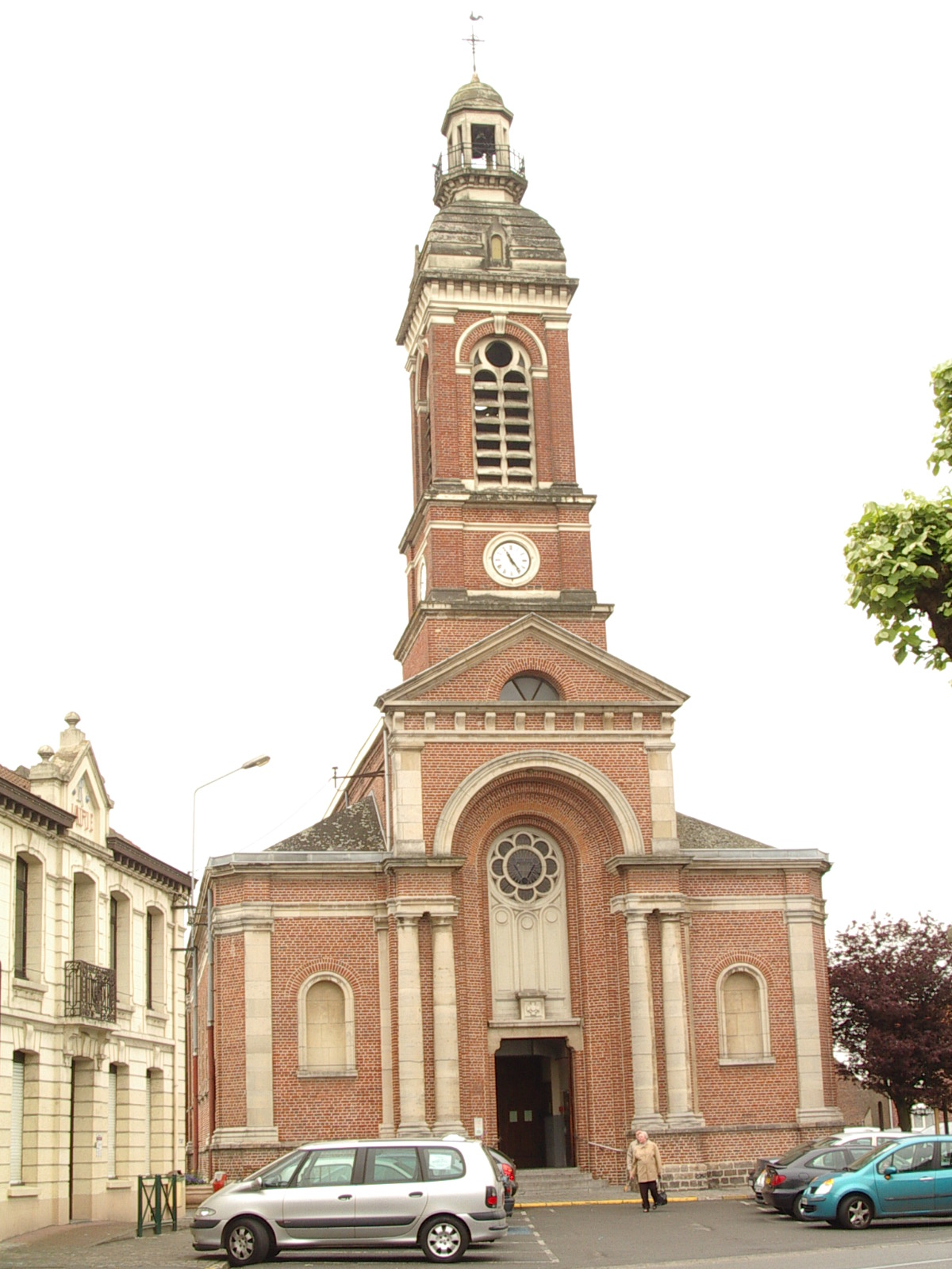 Eglise Saint Martin Gondecourt